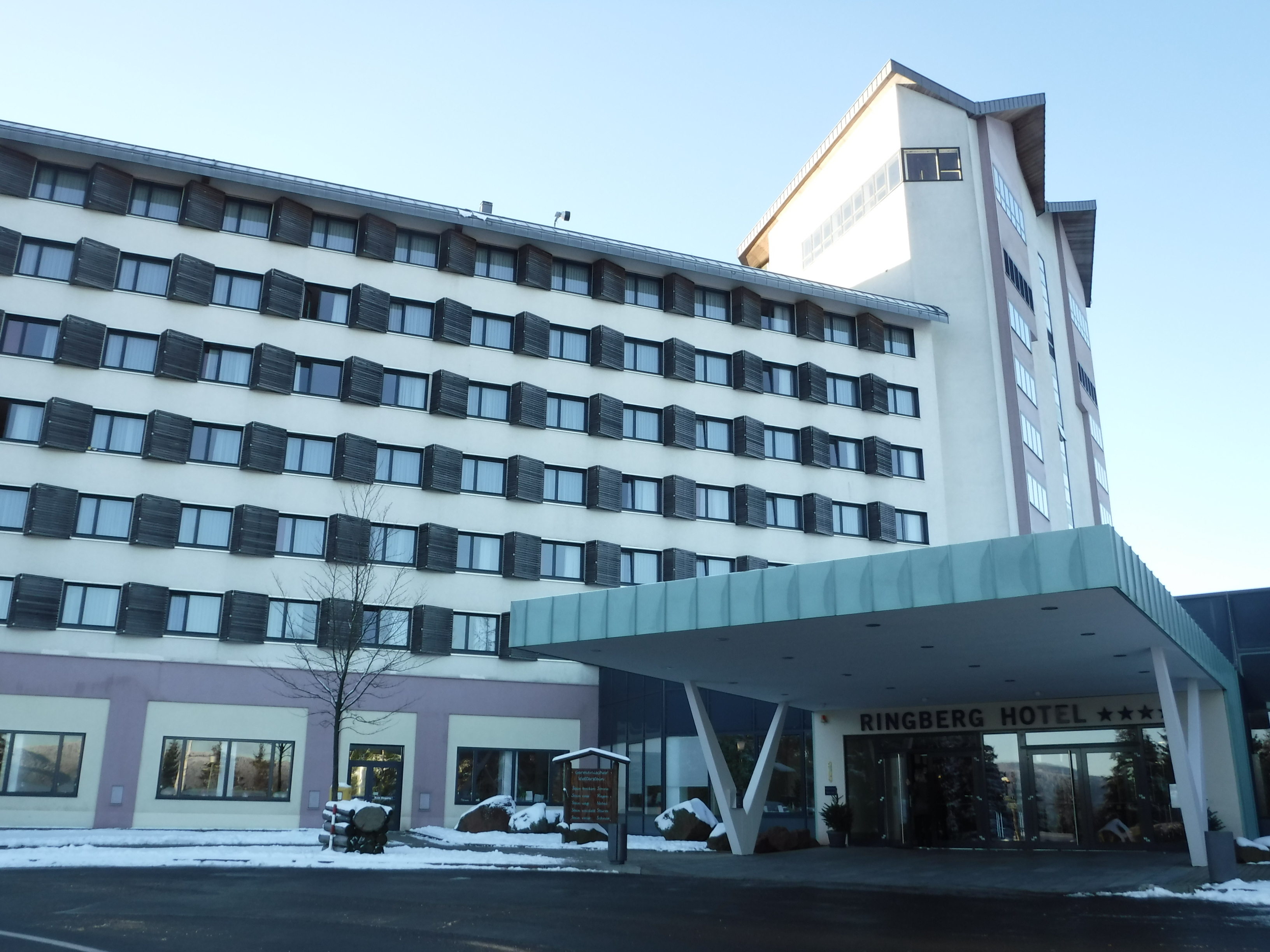 Das Ringberghaus (auch Ringberghotel), ist ein Hotel östlich der Stadt Suhl - Blick von Nordosten